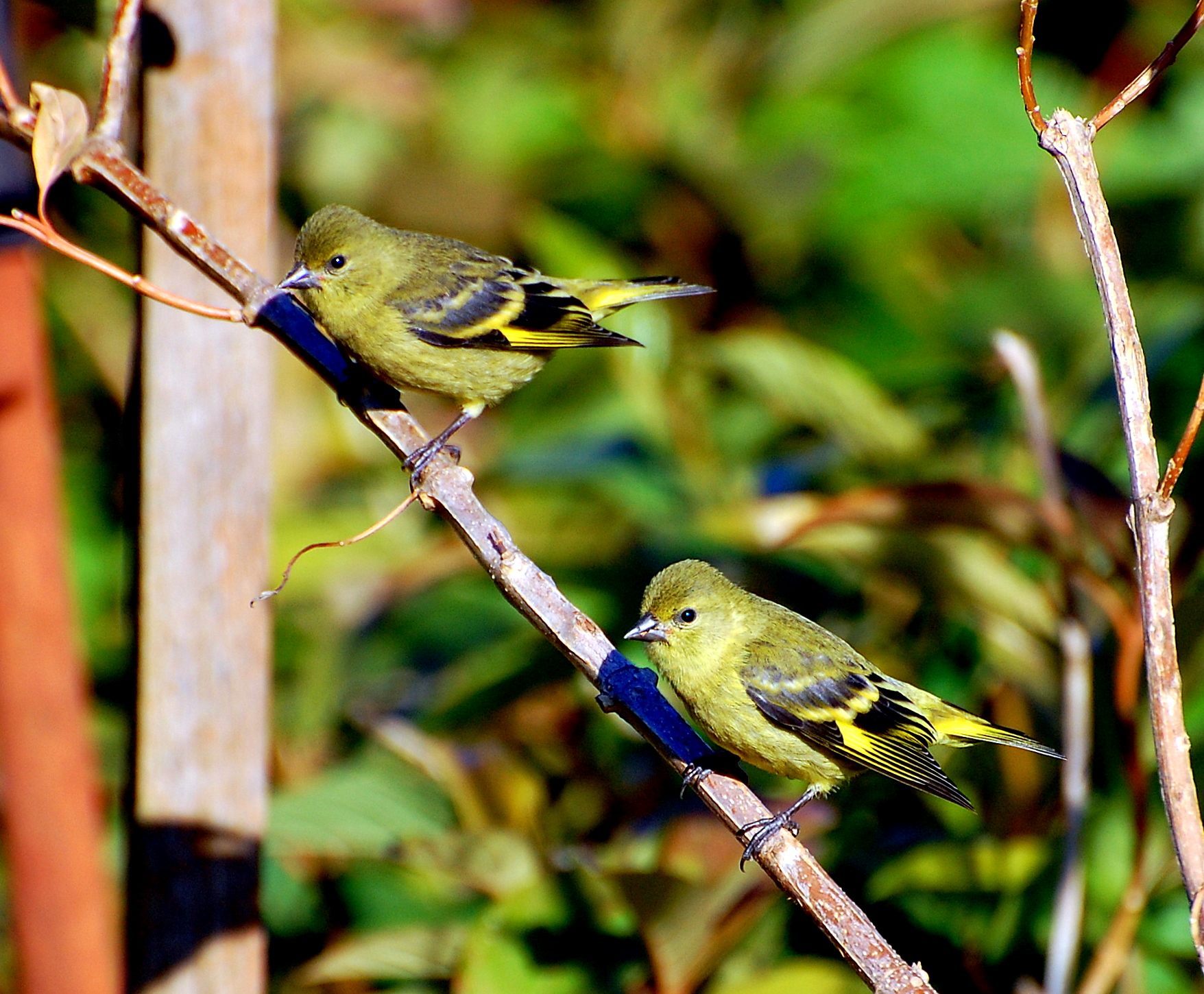 EPR - VIVEIRO DE MUDAS NATIVAS - Fazenda Vô-Vó - Piraju-SP .br